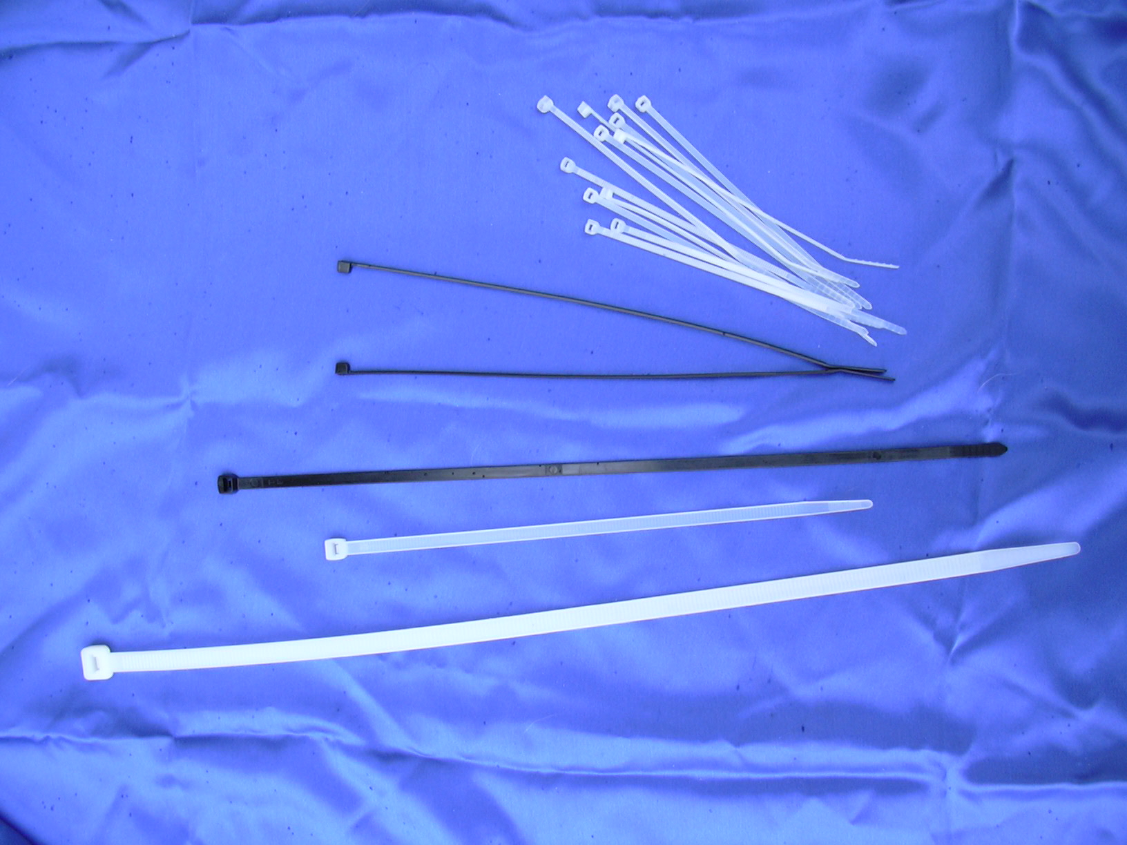 Diverse Sorte Kabelbinder, fotografiert Juni 2004 Copyright Status: GNU Freie Dokumentationslizenz